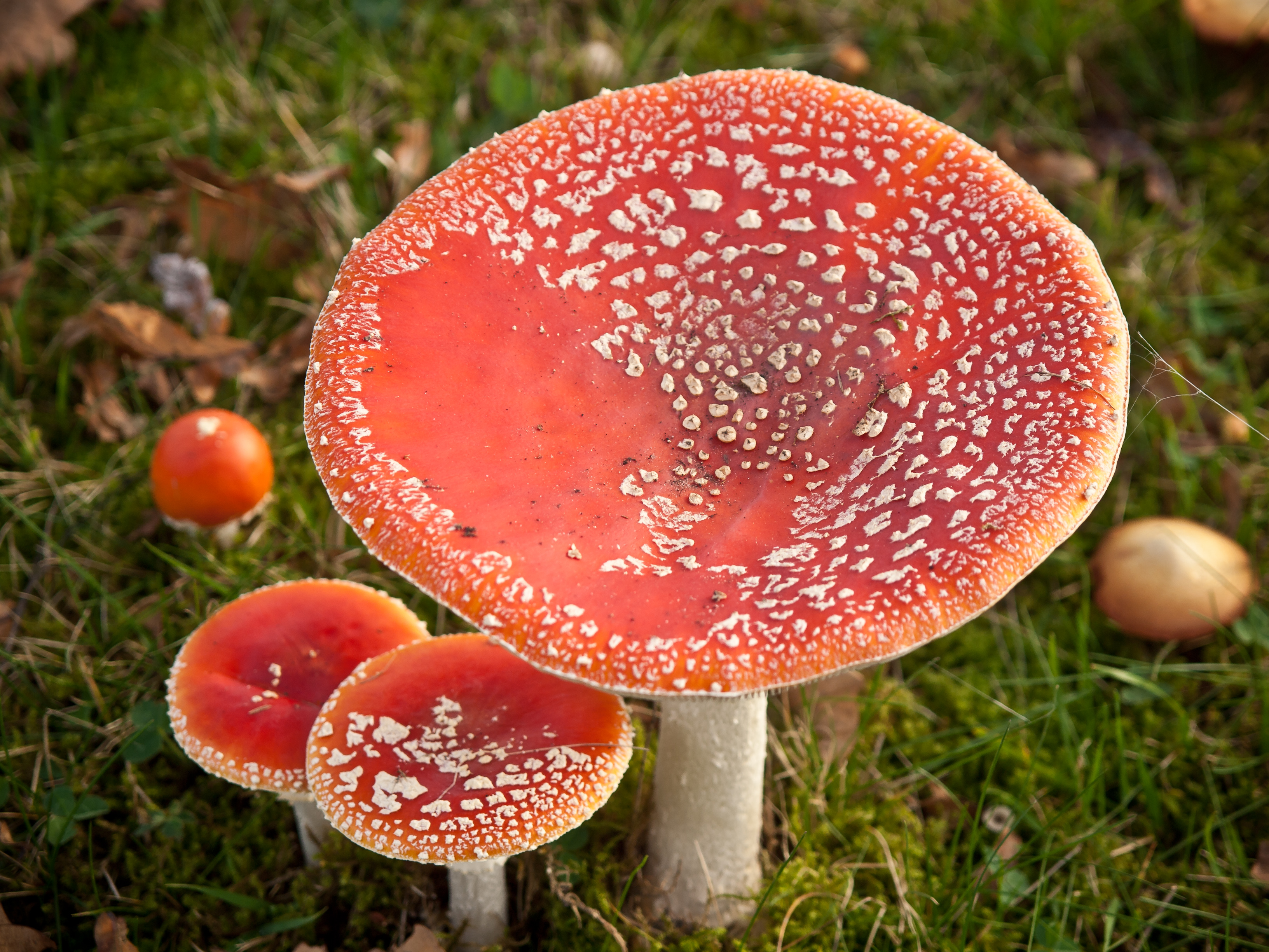 Rood met witte stippen paddenstoelen.